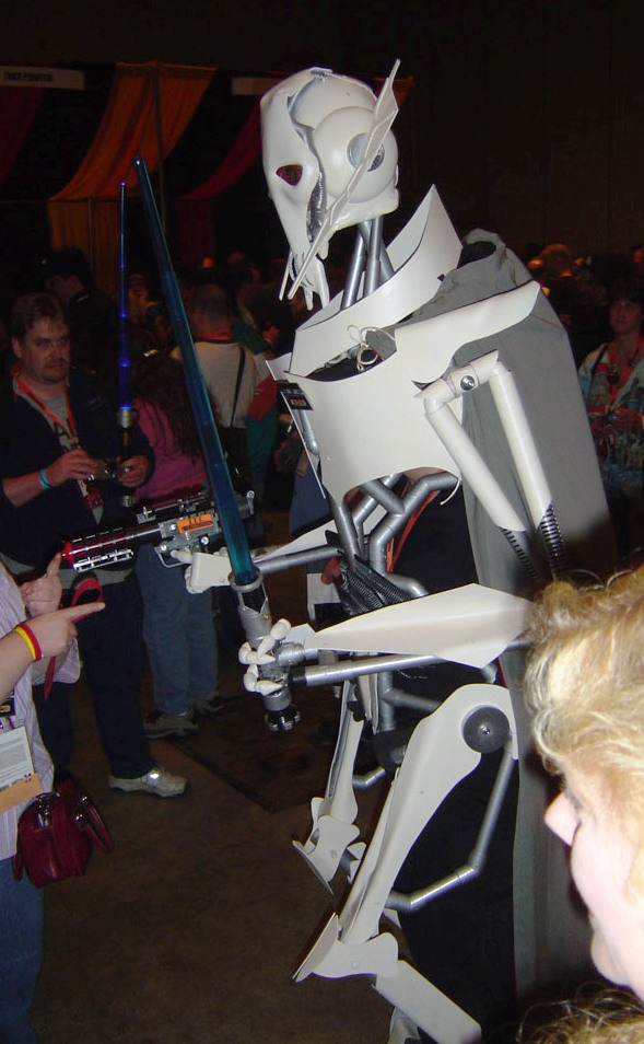 fan-made General Grievous costume